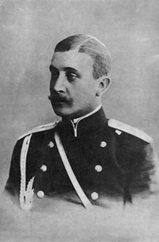 Князь Александр Владимирович Барятинский (1870—1910)